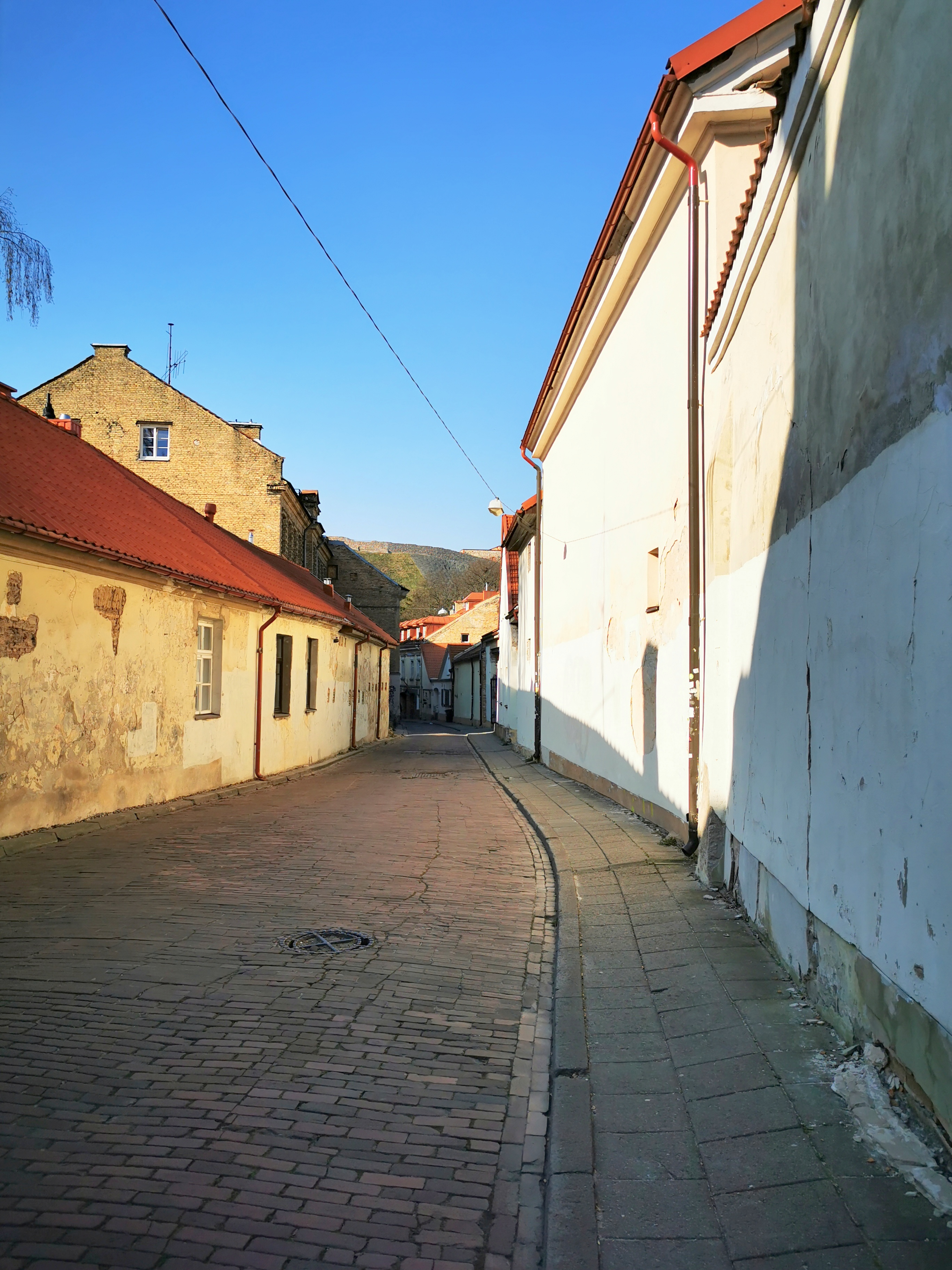 Šiltadaržio gatvė